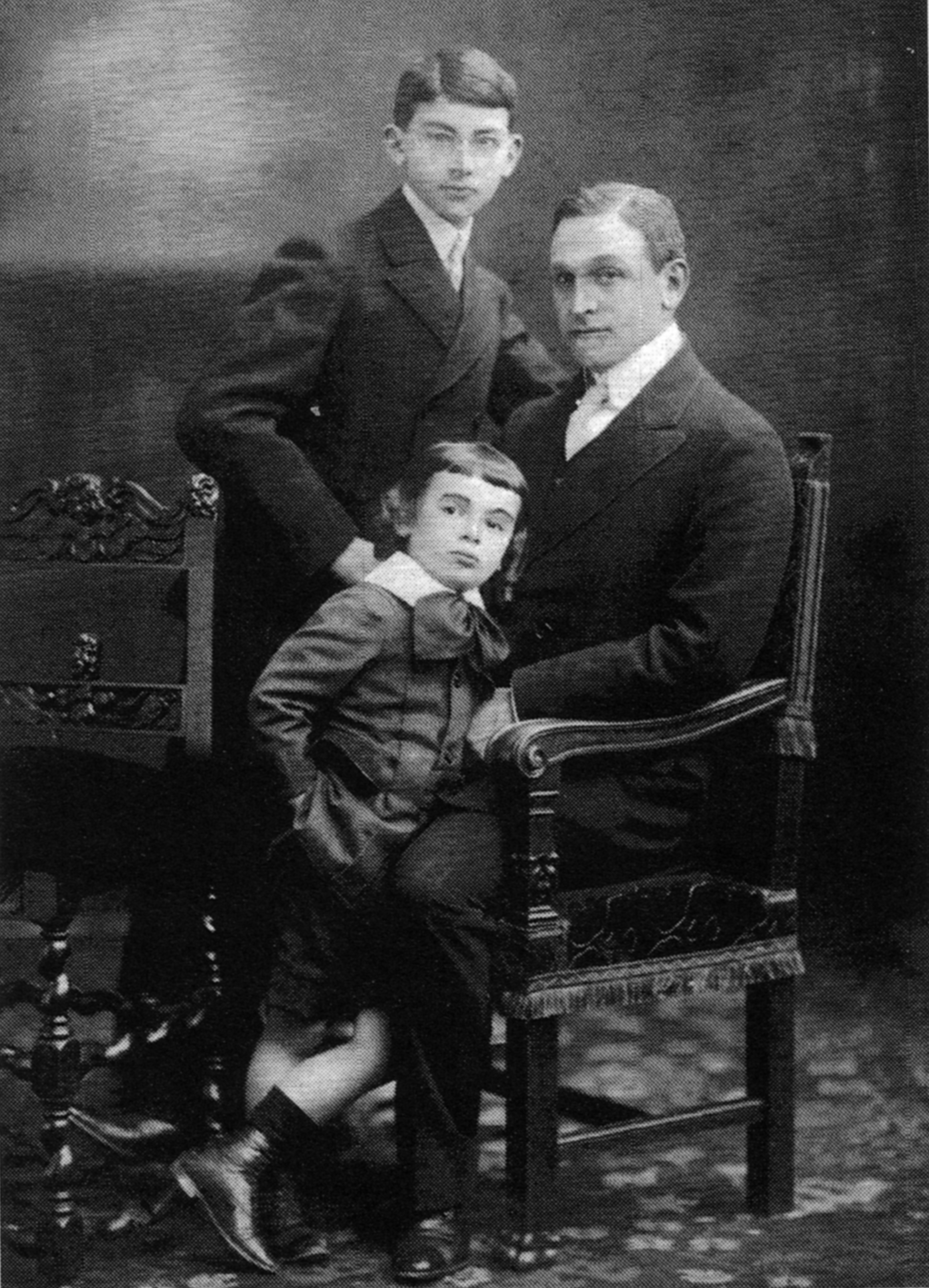 Dr. phil. Fritz Hallgarten mit seinen Söhnen 'Hans Otto' (1893-1916) und 'Paul Arnold' (1902-1930)